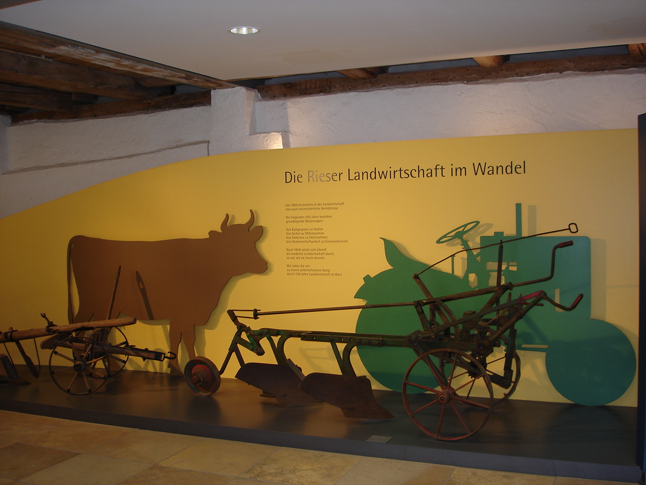 Eingang Museum Maihingen LW-Ausstellung